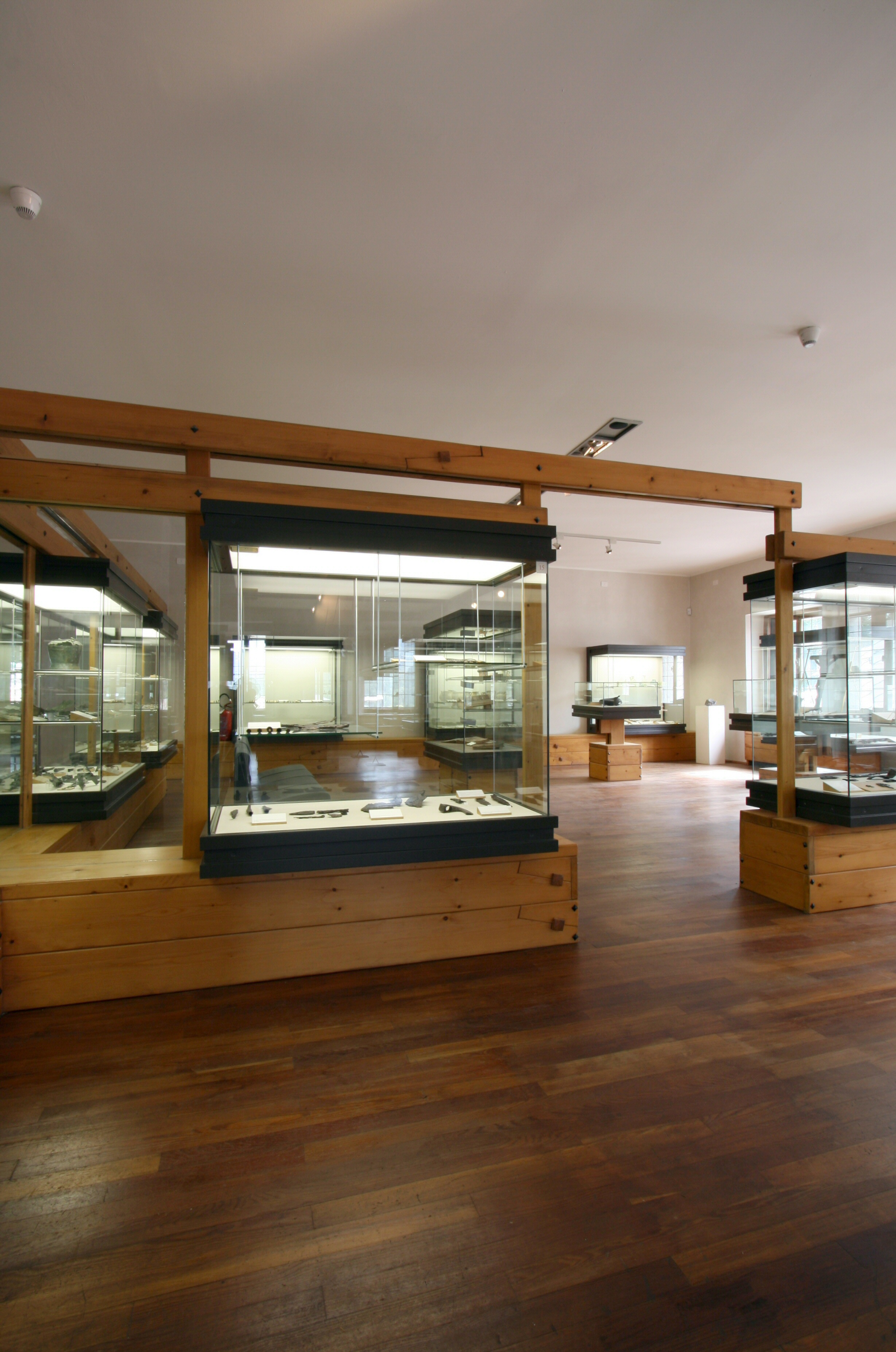 Museo Archeologico di Pieve di Cadore